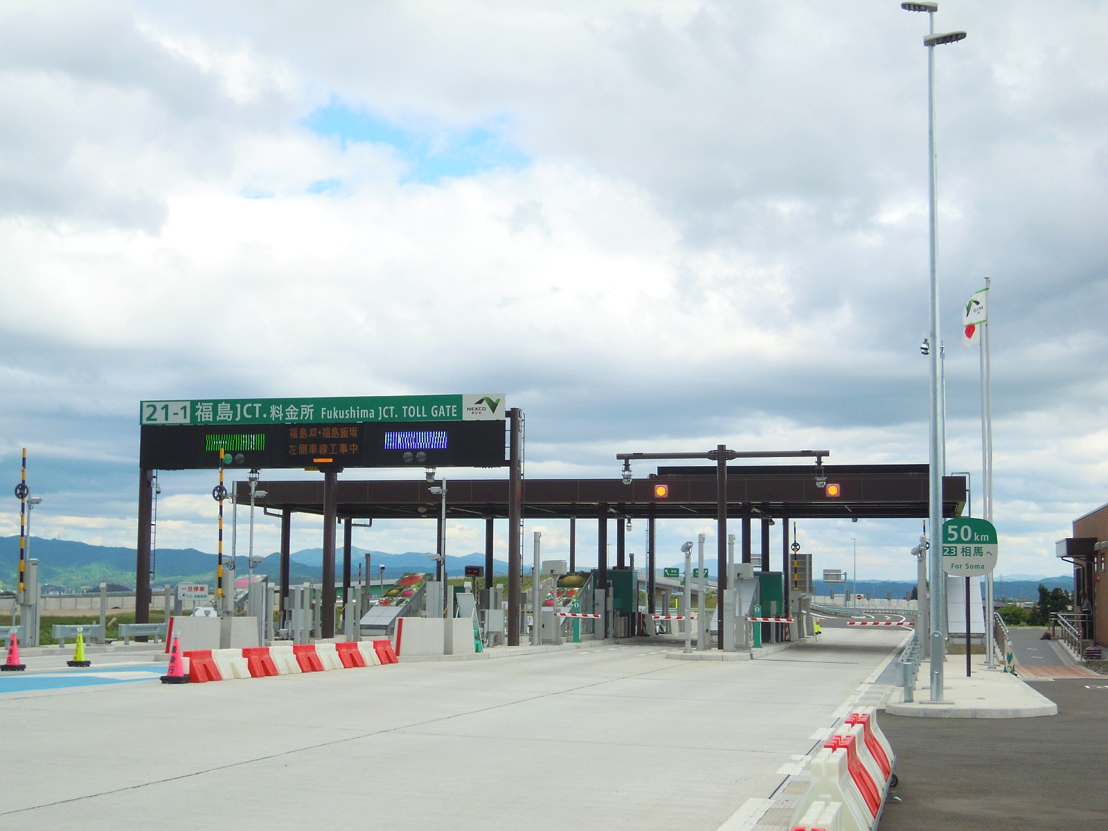 福島県福島市にある東北中央自動車道福島ジャンクション料金所を福島大笹生IC側から